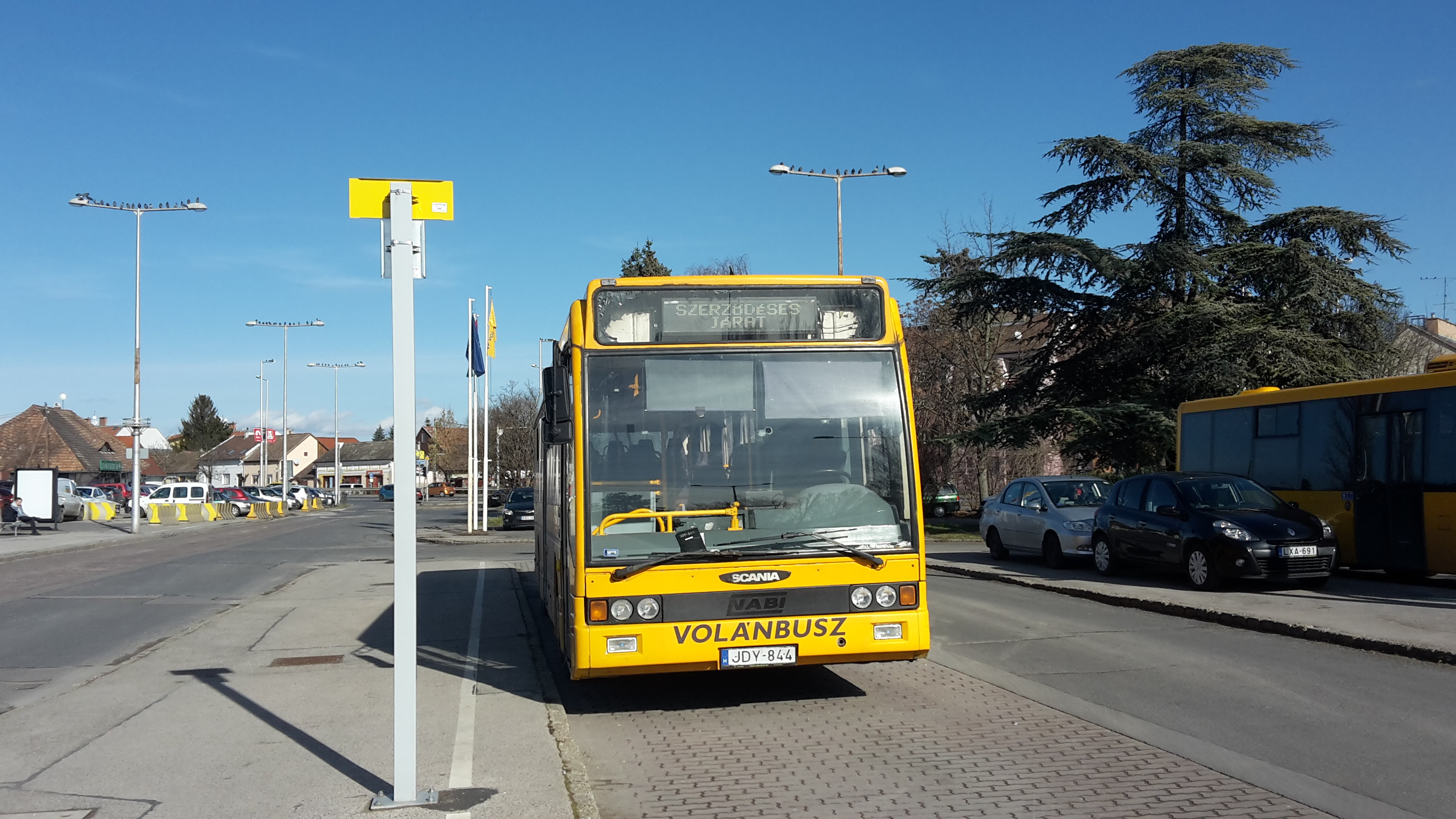 Nabi 700 SE, 2020 február